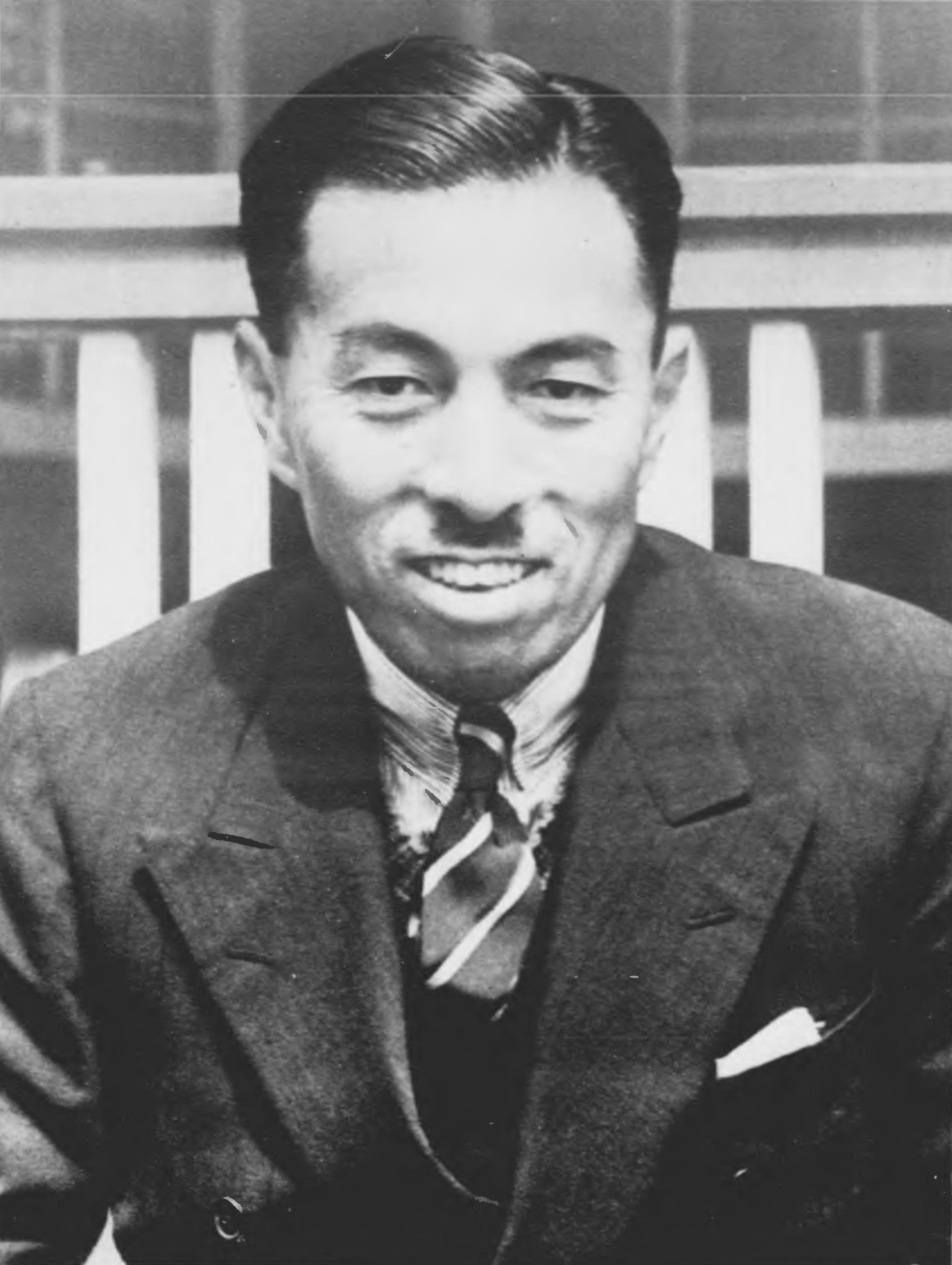 近衛文麿 / Fumimaro Konoe